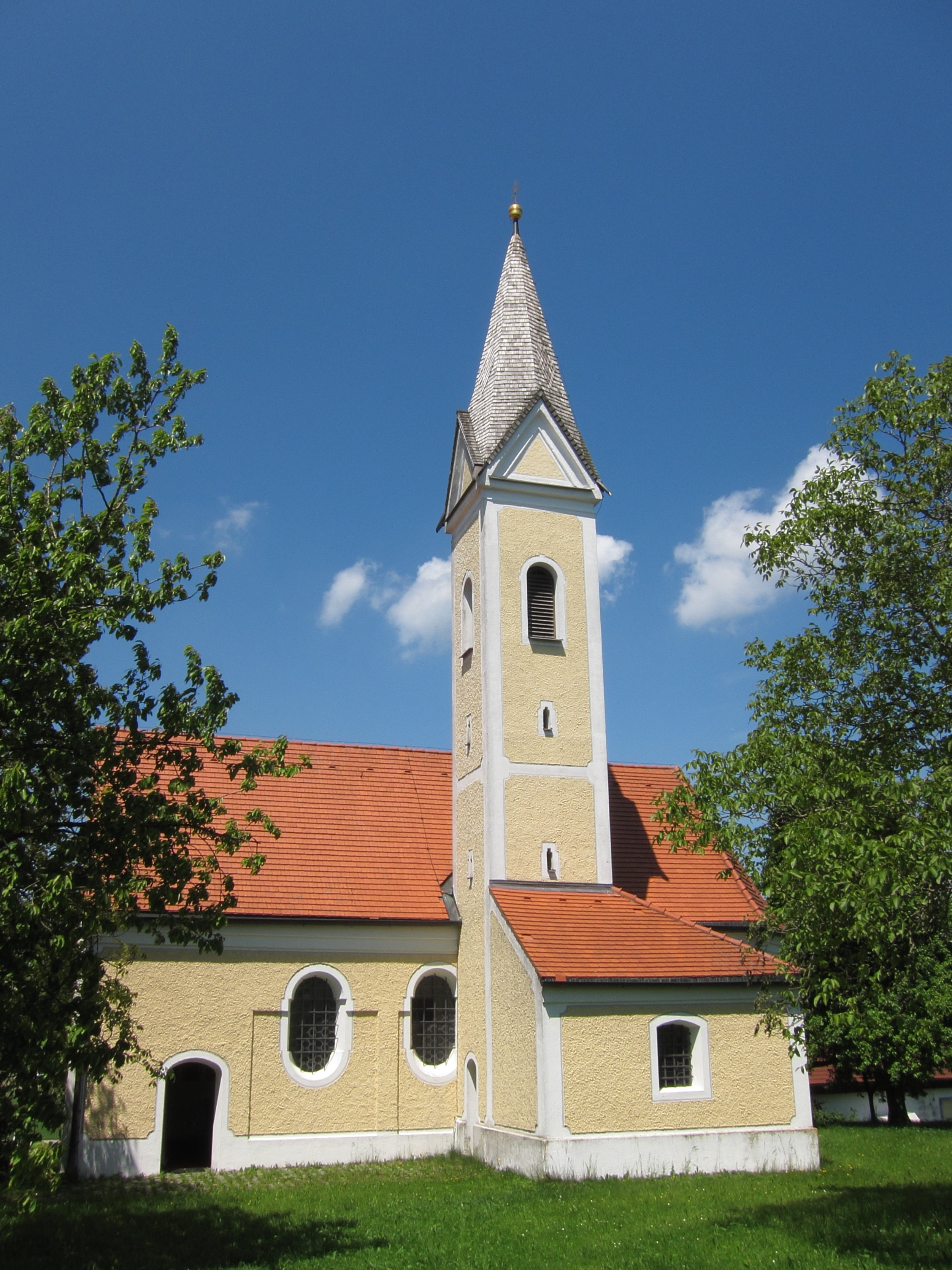 Schnaupping; katholische Filialkirche St. Johannes d. T., Saalbau mit polygonalem Chorschluss, Chorflankenturm und angefügter Sakristei, im Kern spätgotisch, barockisiert 17./18. Jahrhundert.